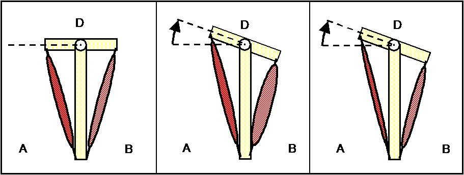 Die drei Abbildungen (Klee, 1995) veranschaulichen den Zustand einer muskulären Balance bzw. einer muskulären Dysbalance.